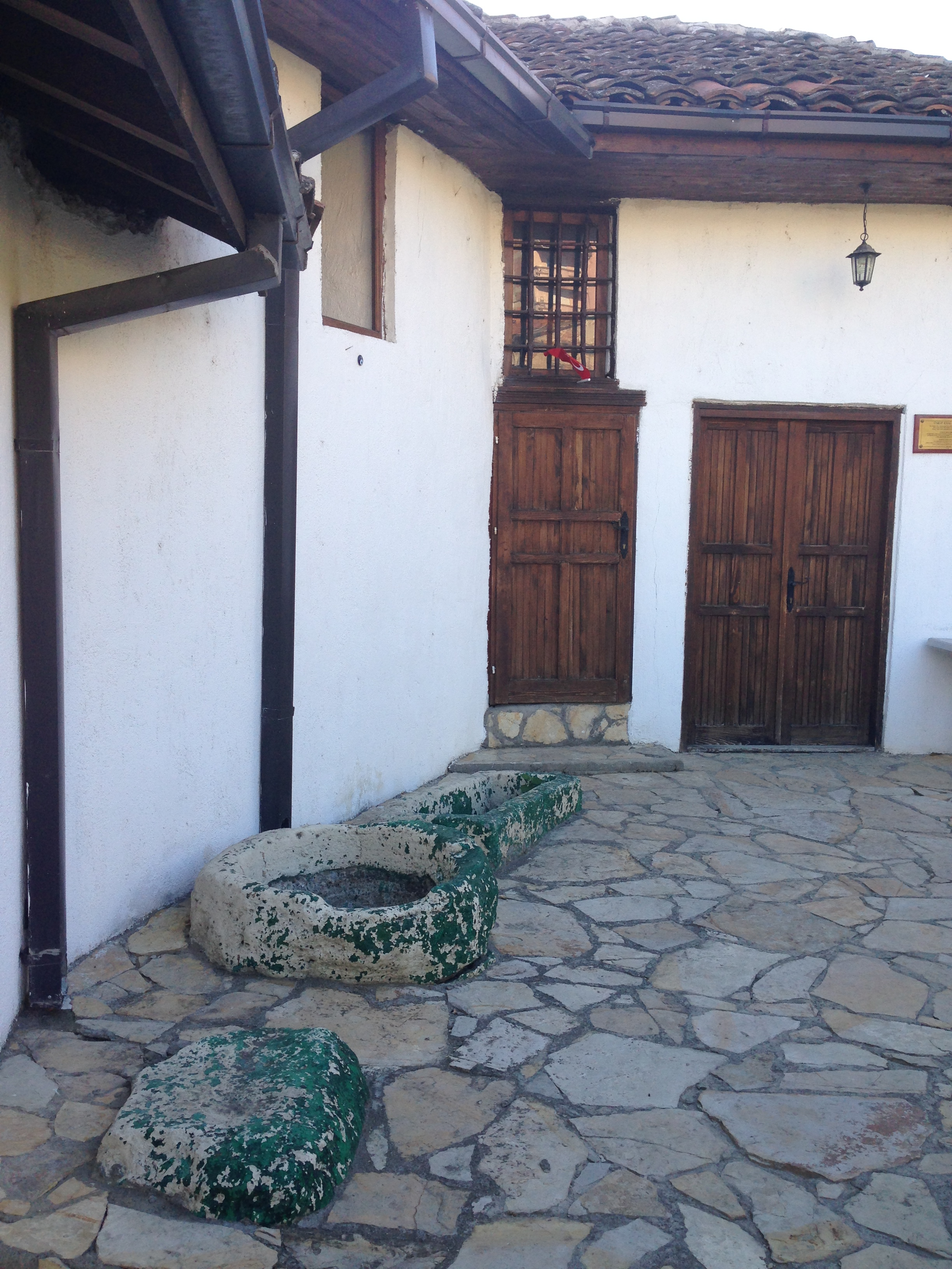 Teqeja Rifai Shkup -1818